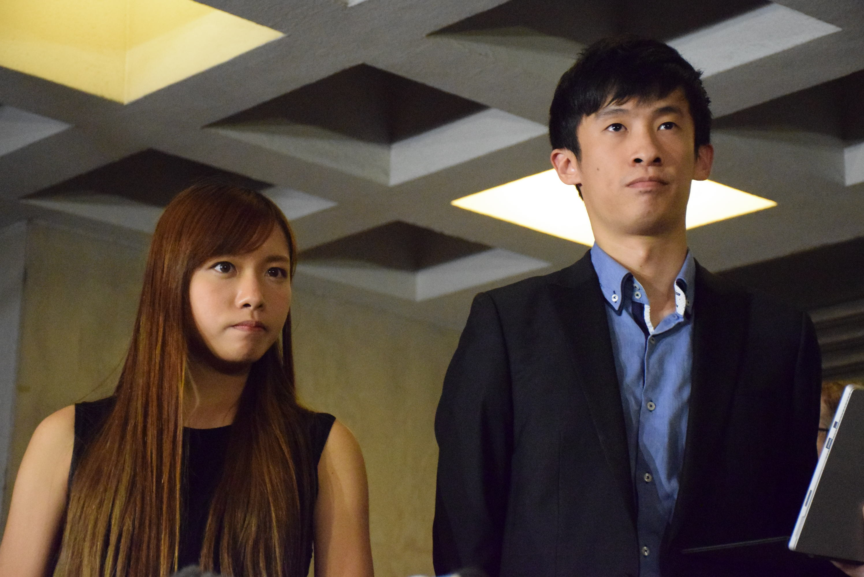 香港本土派青年新政游蕙禎及梁頌恆。（美國之音特約記者湯惠芸攝）